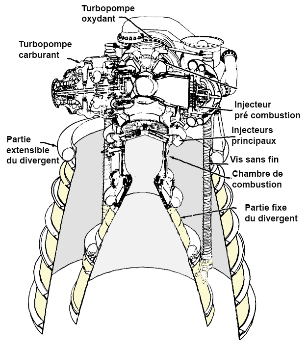 RL-10-à-divergent-extensible avec libellés en francais